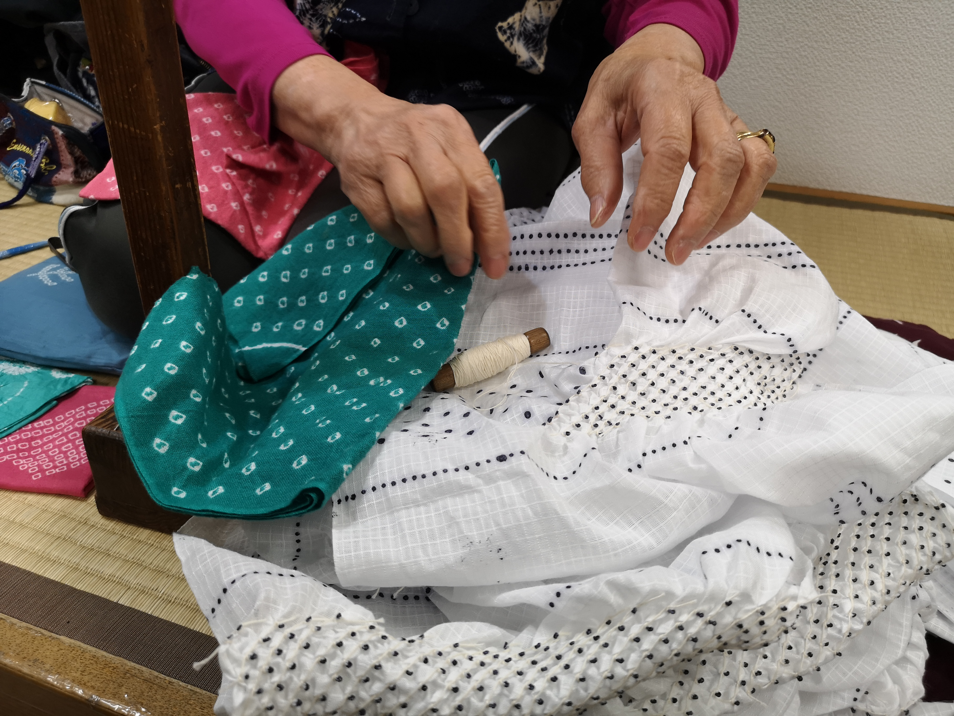 有松絞りの「鹿の子絞」のくくった布と、染色後の完成品。